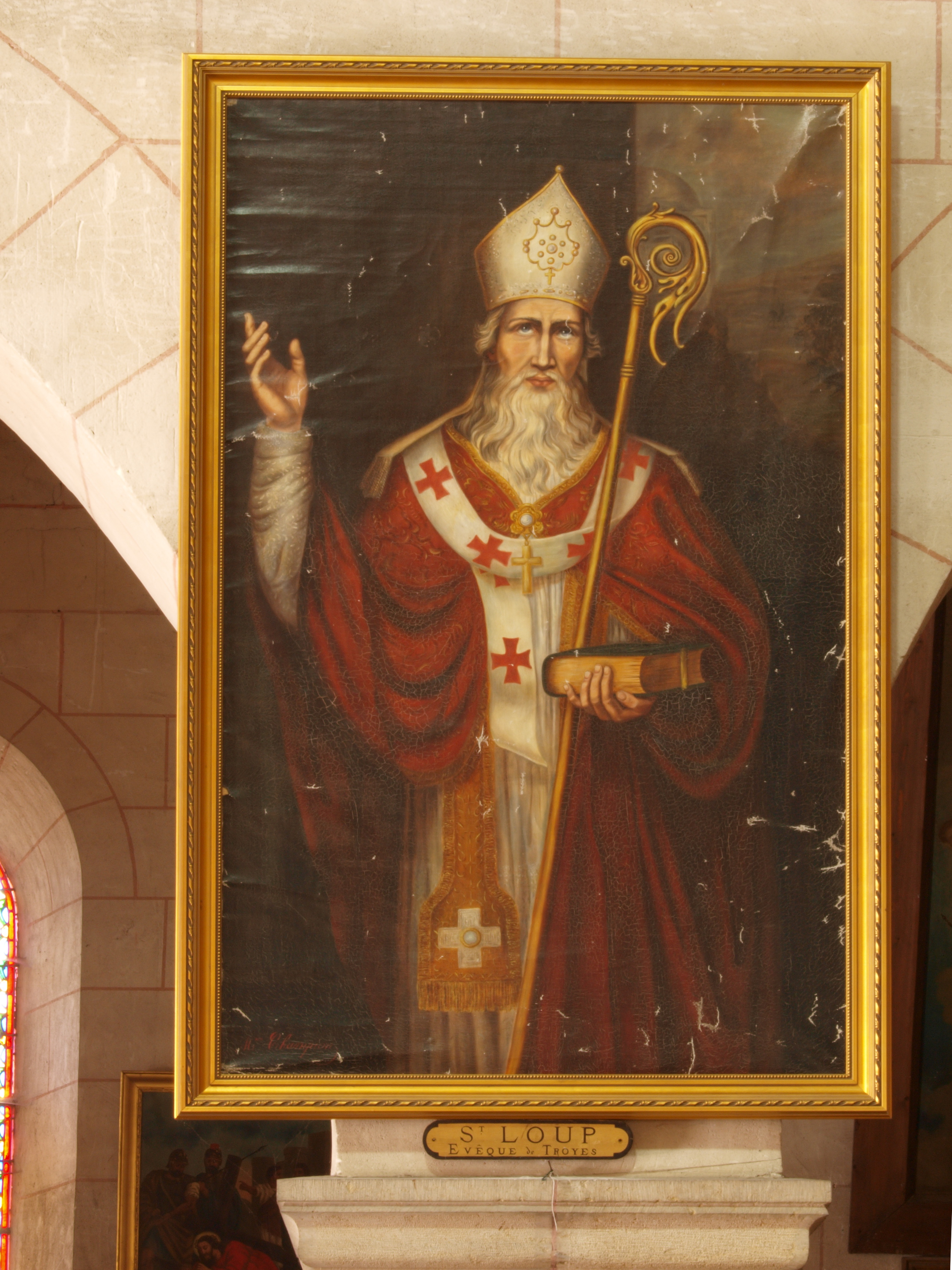 Église Saint-Loup-de-Troyes de Bléneau (Yonne, France)